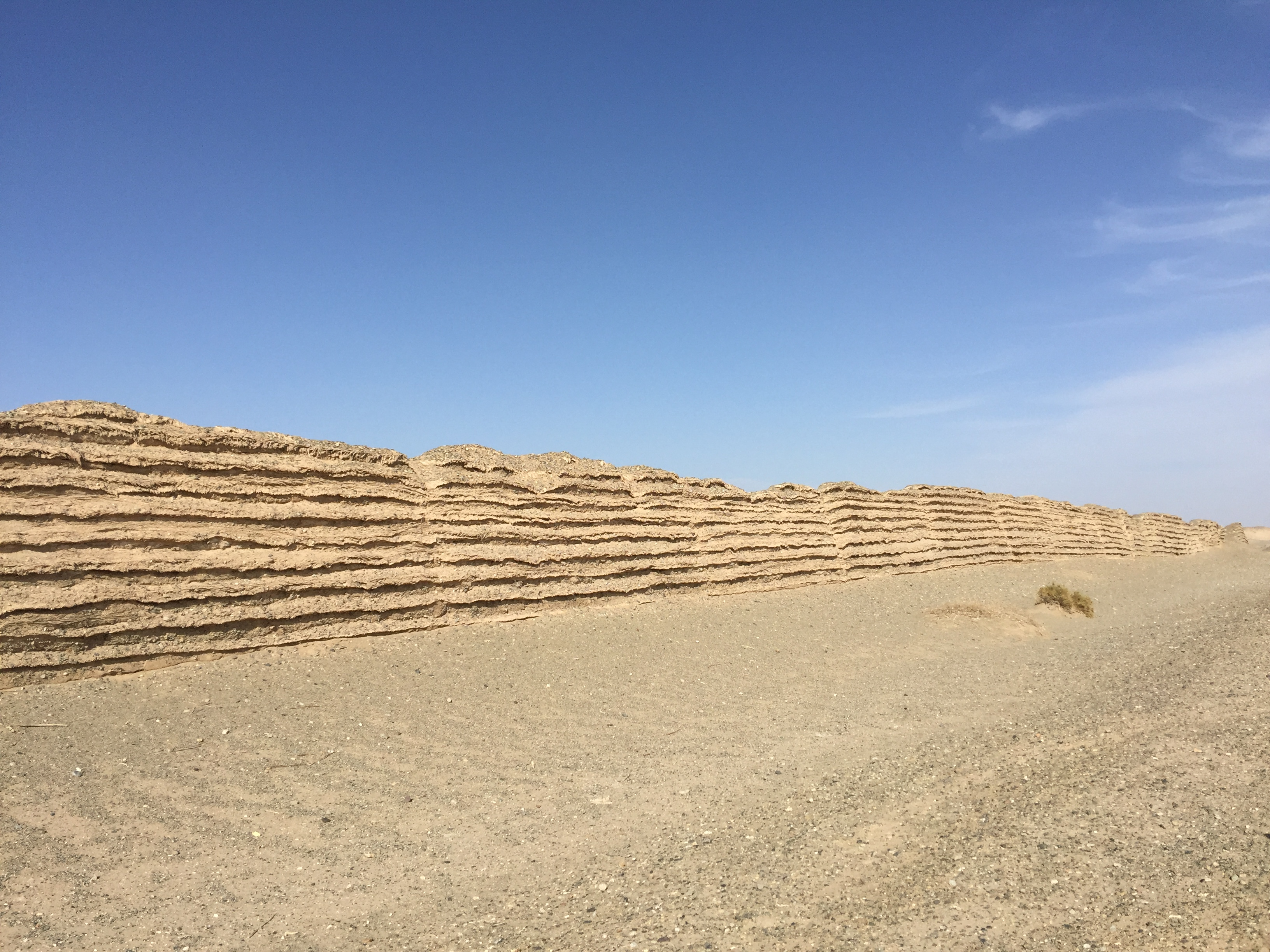 敦煌汉长城遗址